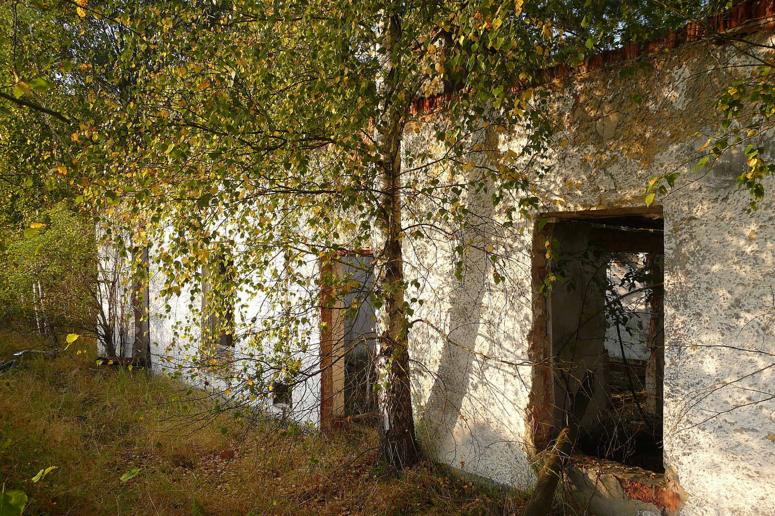 Ruiny v zaniklé obci Jezová